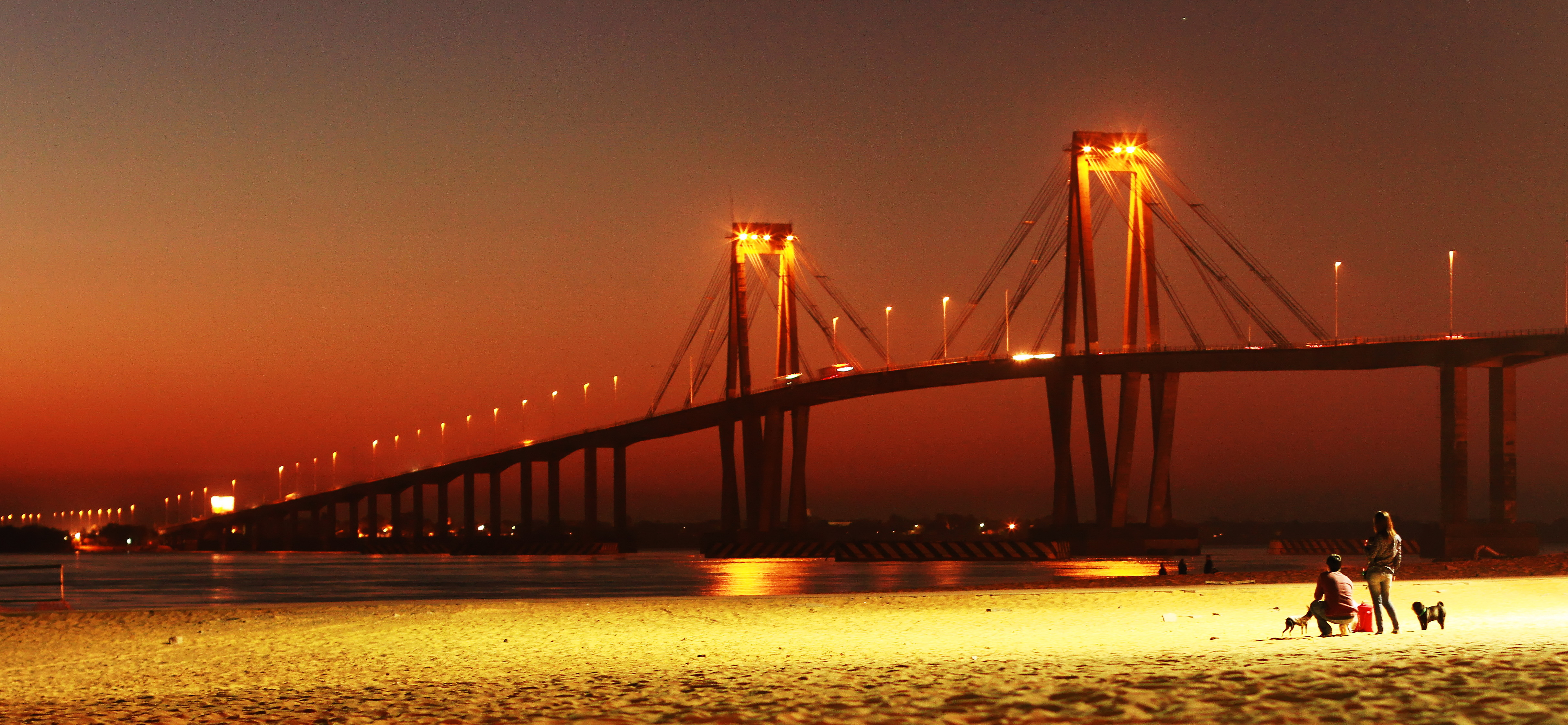 Puente General Belgrano desde Playa Arazaty